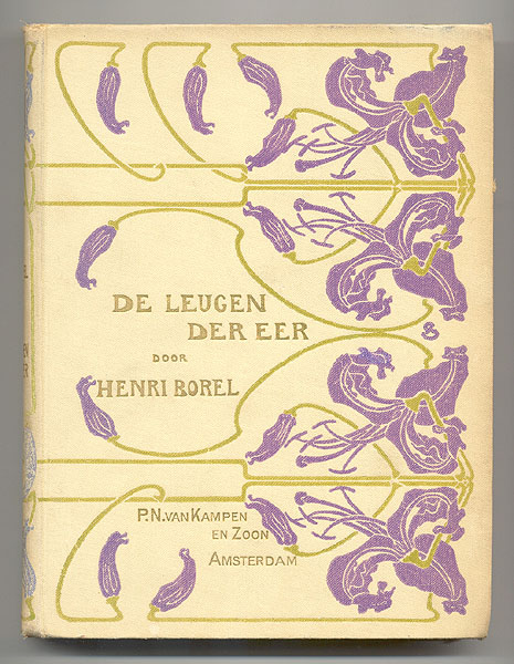 Boekomslag: De leugen der eer. Zonder druk 1903. Auteur: H. Borel. Bandontwerp: A. Sipkema. Uitgeverij: Van Kampen & Zoon